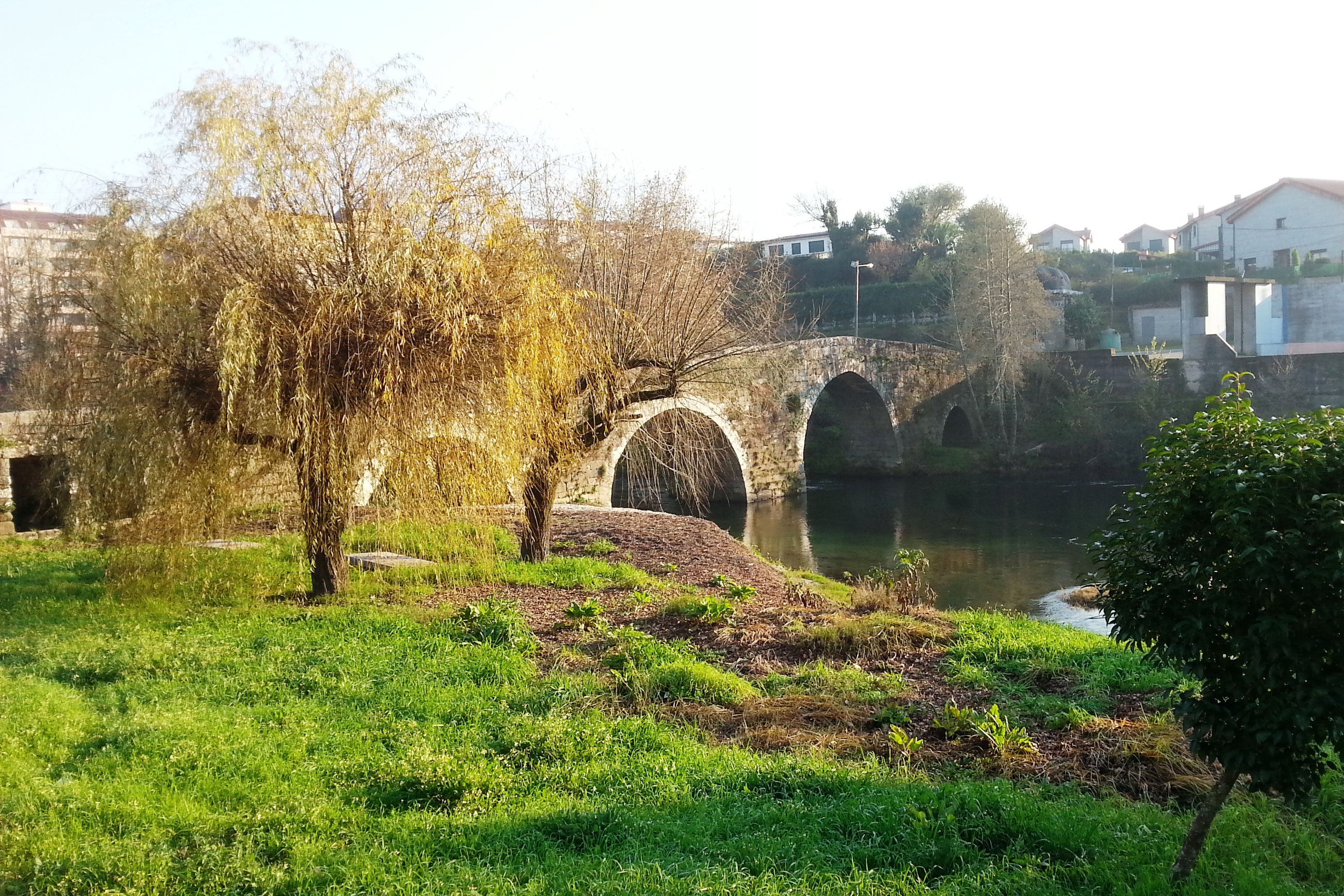 Véxase o título e as categorías